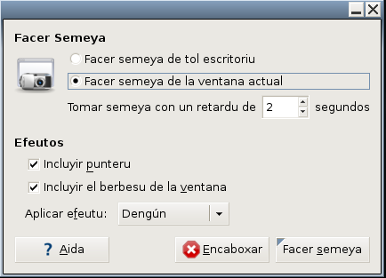 Captura de pantalla de gnome-screenshot